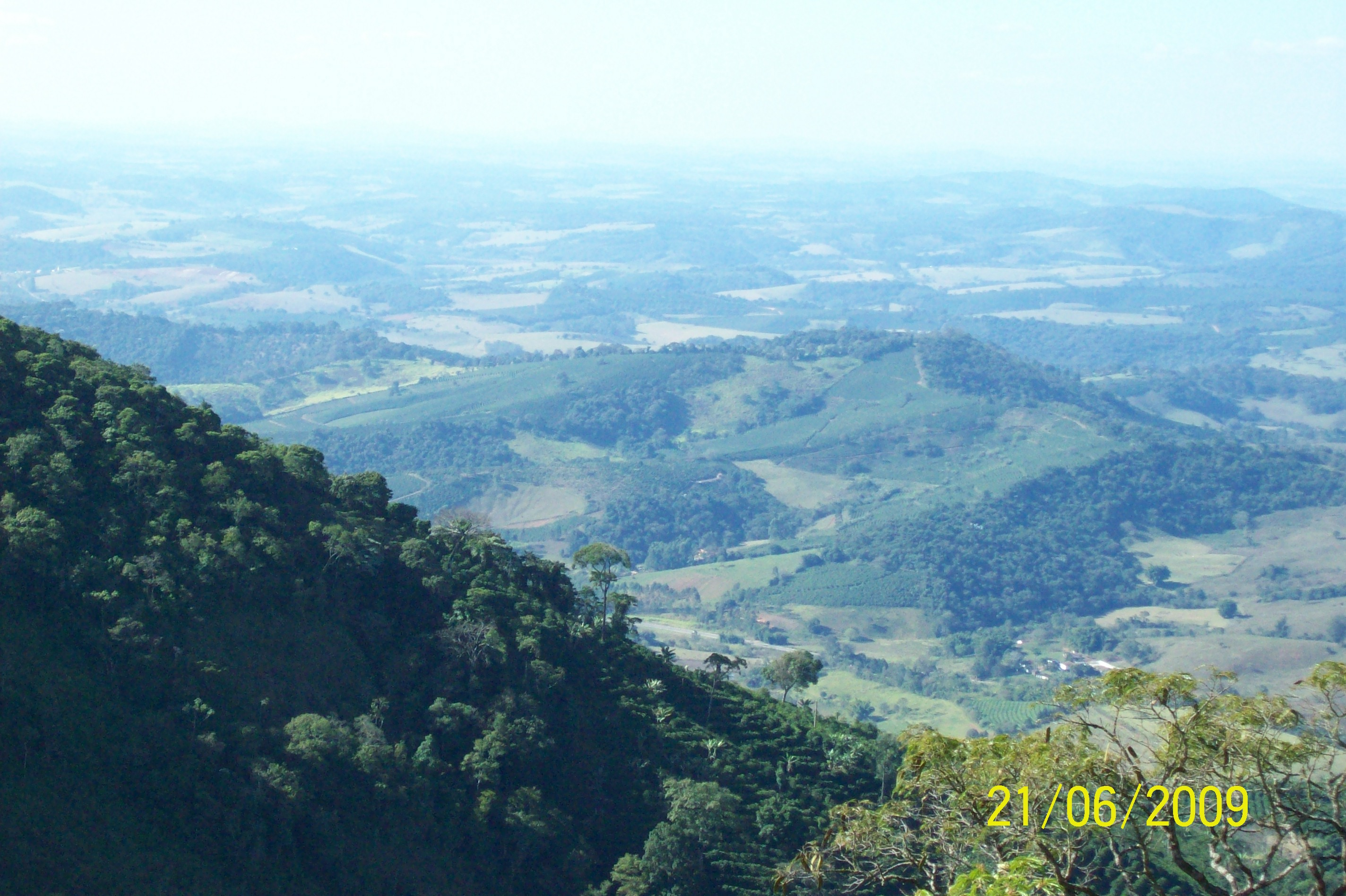 Vista_Horizonte_do_Pico_Agudo_São_João_da_Mata